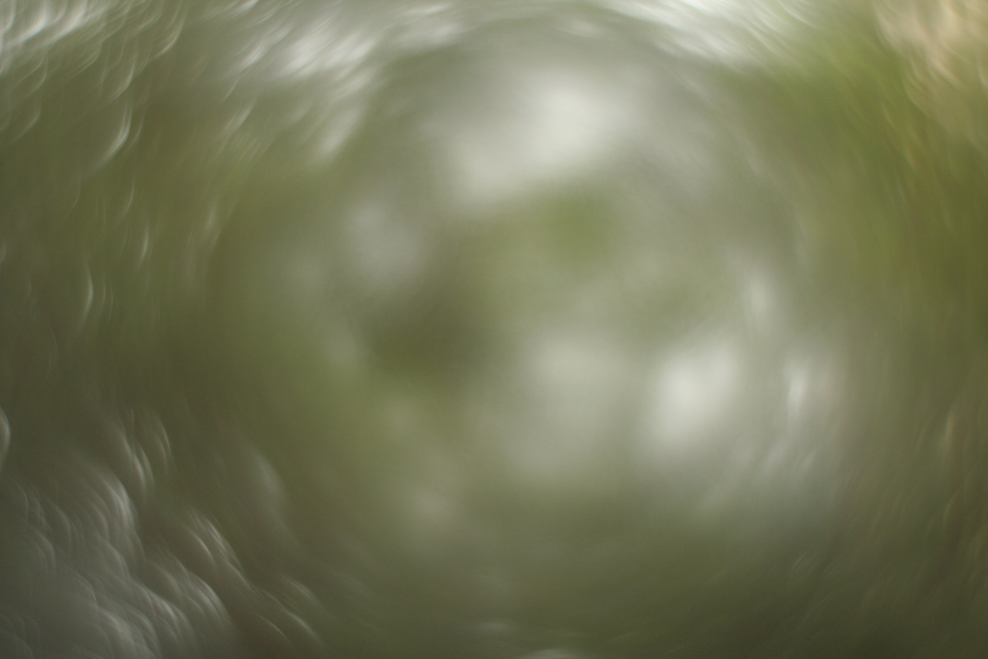 Efecto tunel Helios44M-4 con el lente exterior invertido